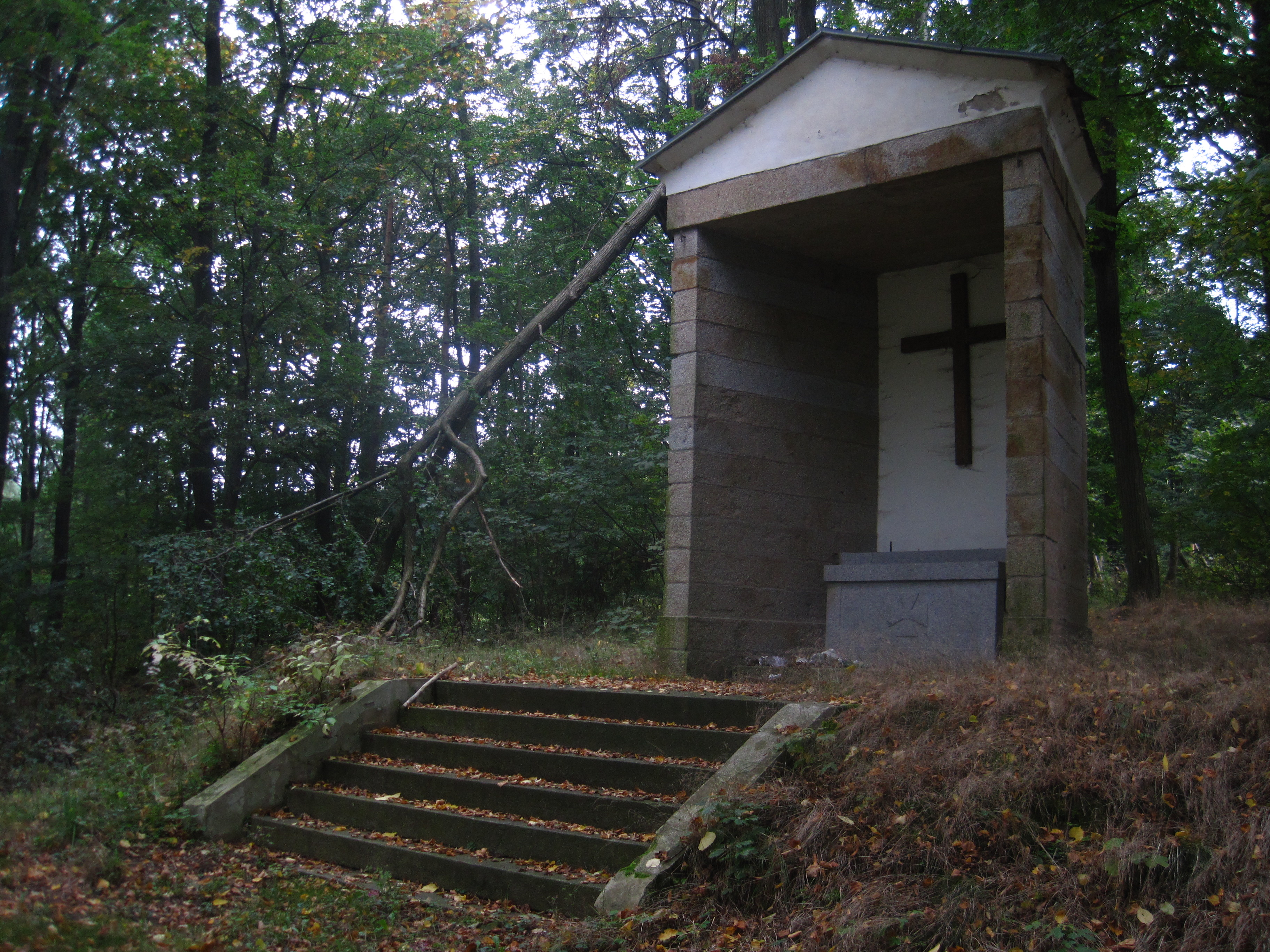 Křížová cesta, pp. 402/3, 403, 404, 435, severně od vsi při modré značce, Království (Šluknov).